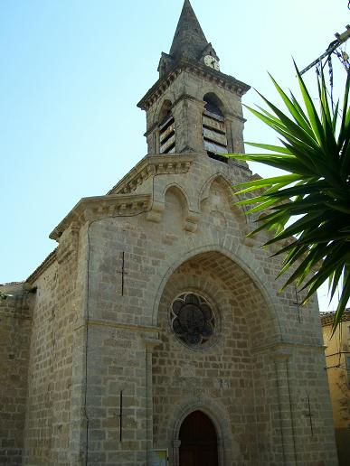 Frontansicht der Pfarrkirche Saint-Julien Saint-Félix-de-Lodez